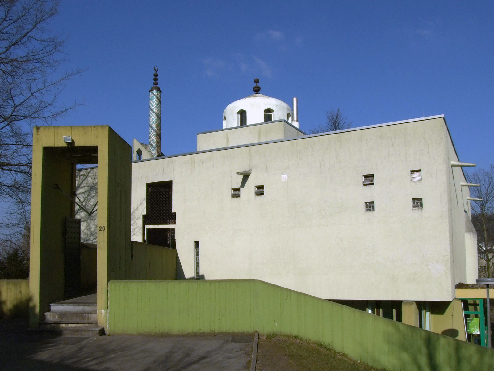 Aachen, Islamisches Zentrum Aachen (Bilal Moschee) e.V., Professor-Pirlet-Str. 20